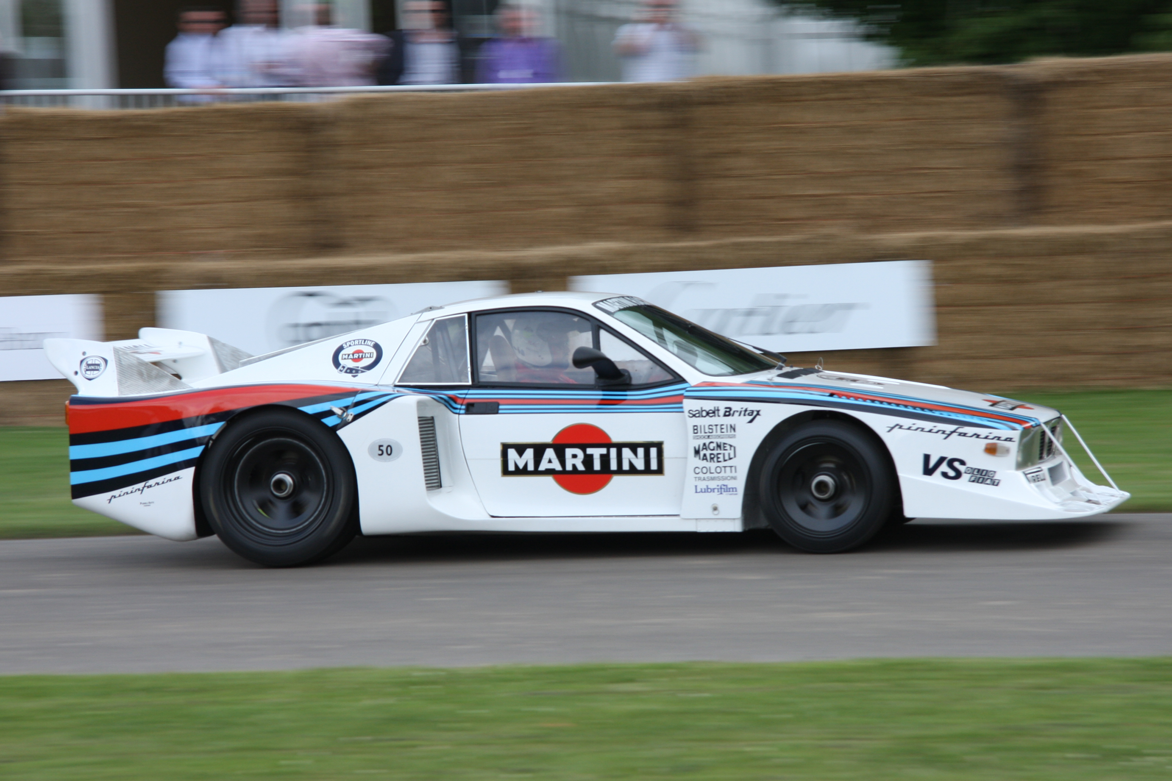 Built 1981. 1.4 litre 4 cylinder turbo